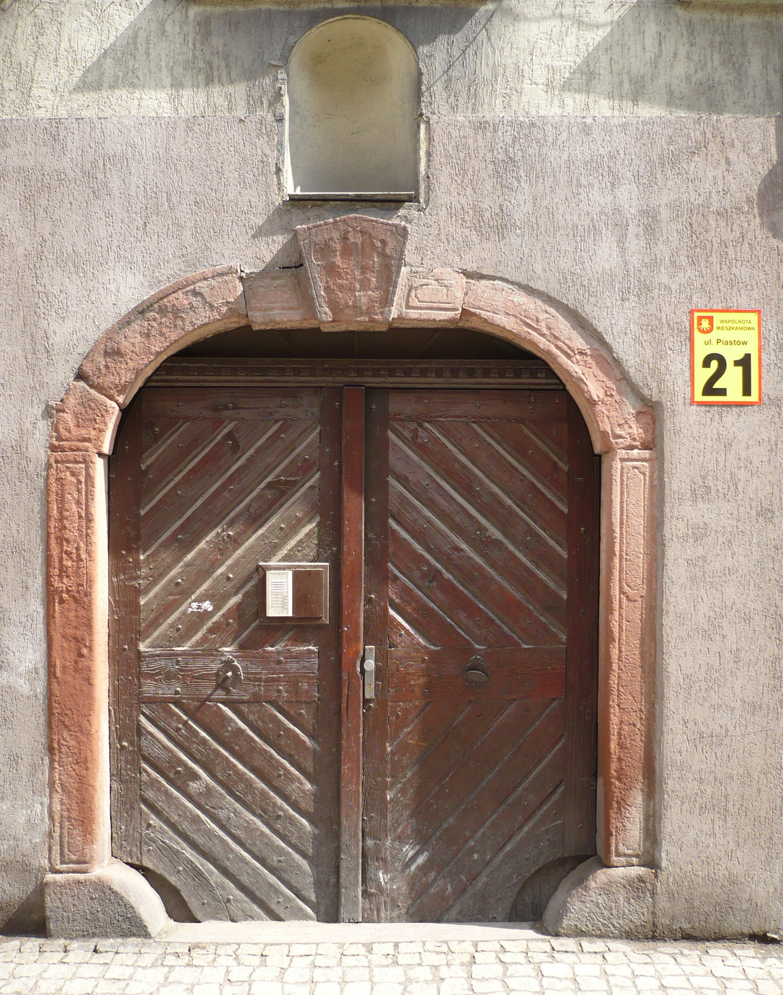 Nowa Ruda, ul. Piastów 21 - brama domu z przełomu XVIII i XIX w., przeb. w 1813 r. i w XX w. (zabytek nr A/947/1439/WŁ z 10.07.1995)